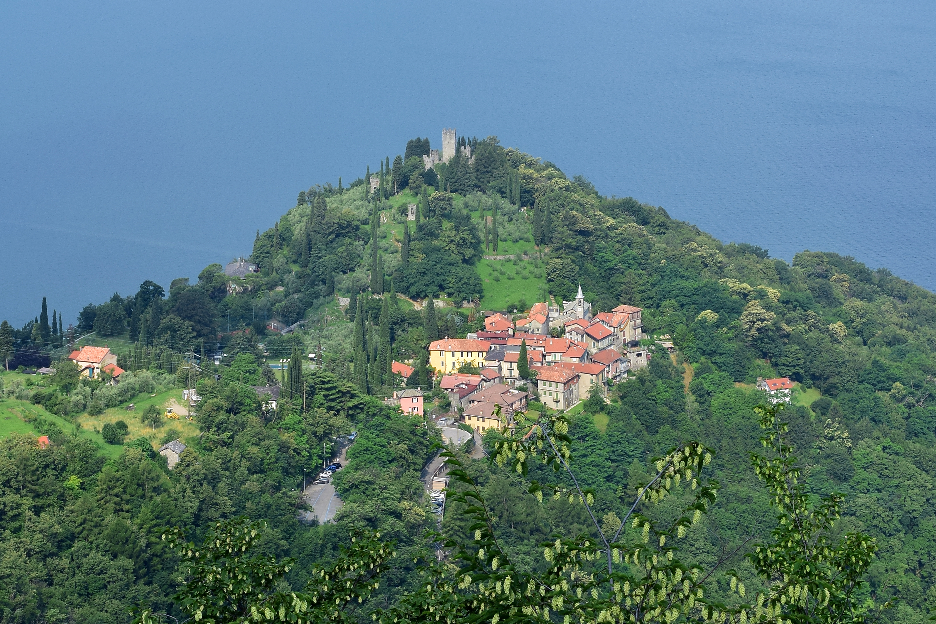 Blick auf Vezio von der Straße nach Esino Lario